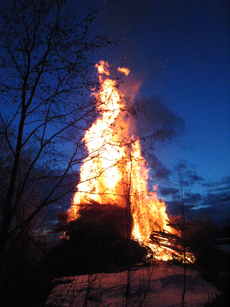 Pääsiäiskokko